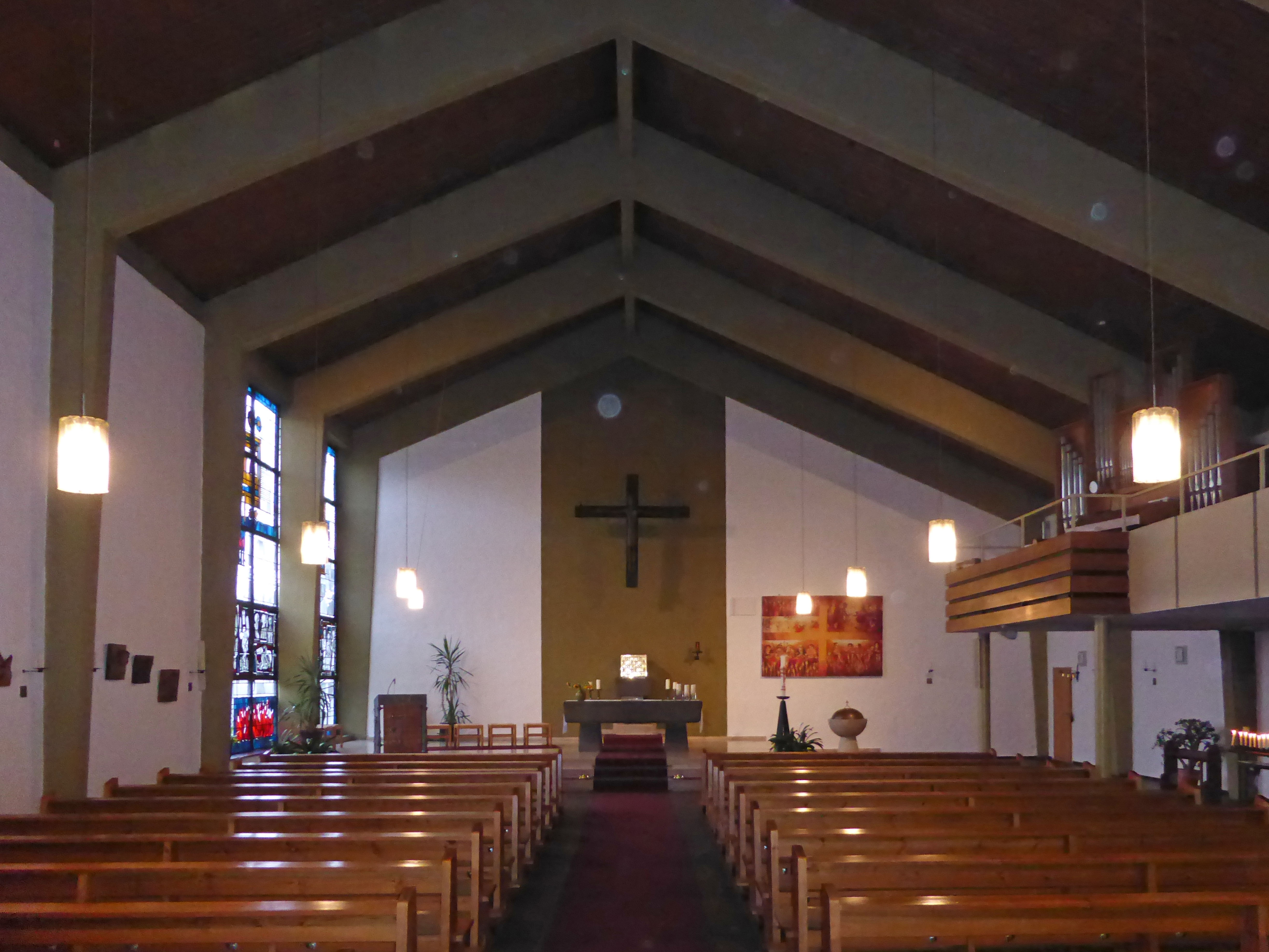 Kath. Hl.-Geist-Kirche in Salzgitter-Hallendorf.